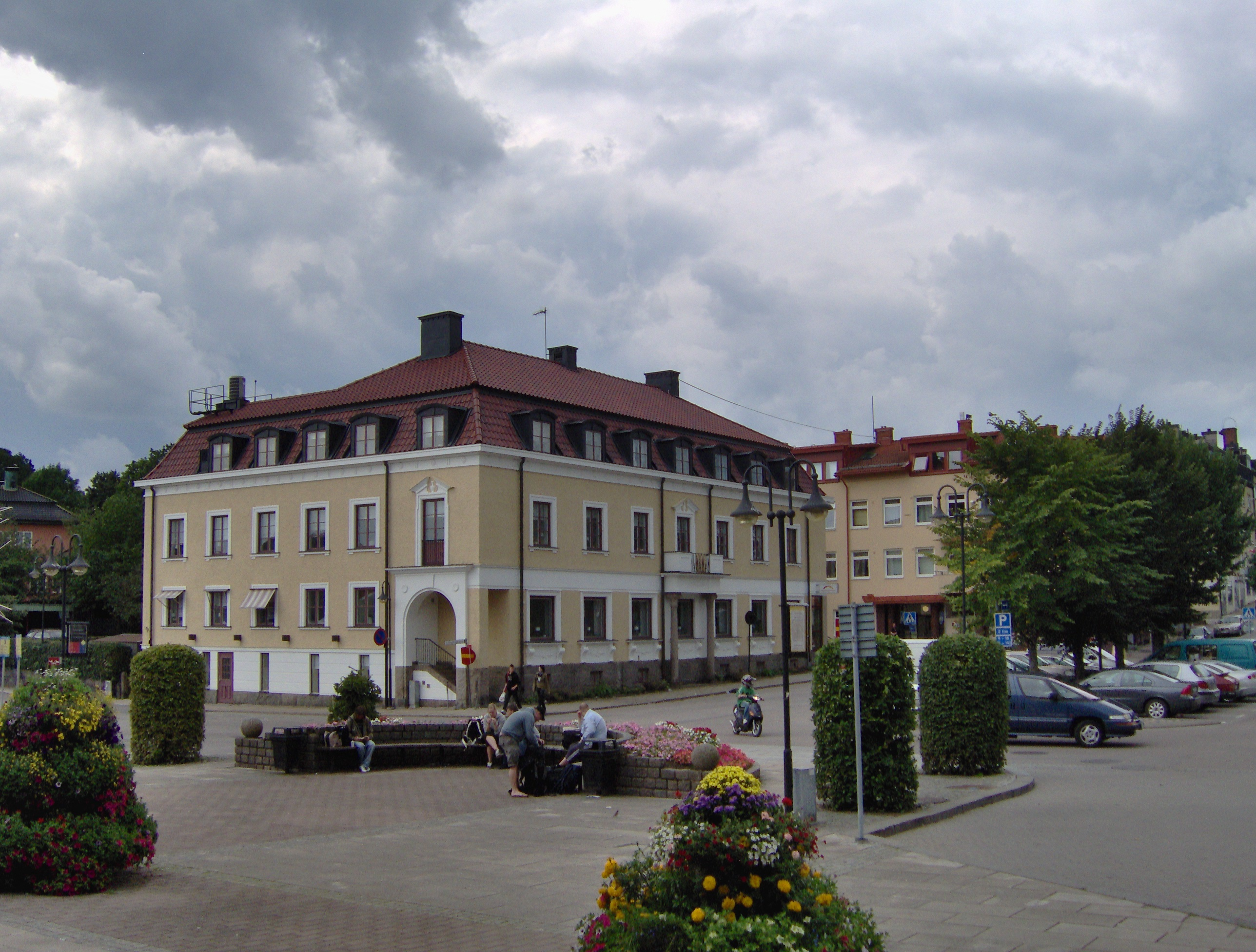 Hpim1856.Jpg